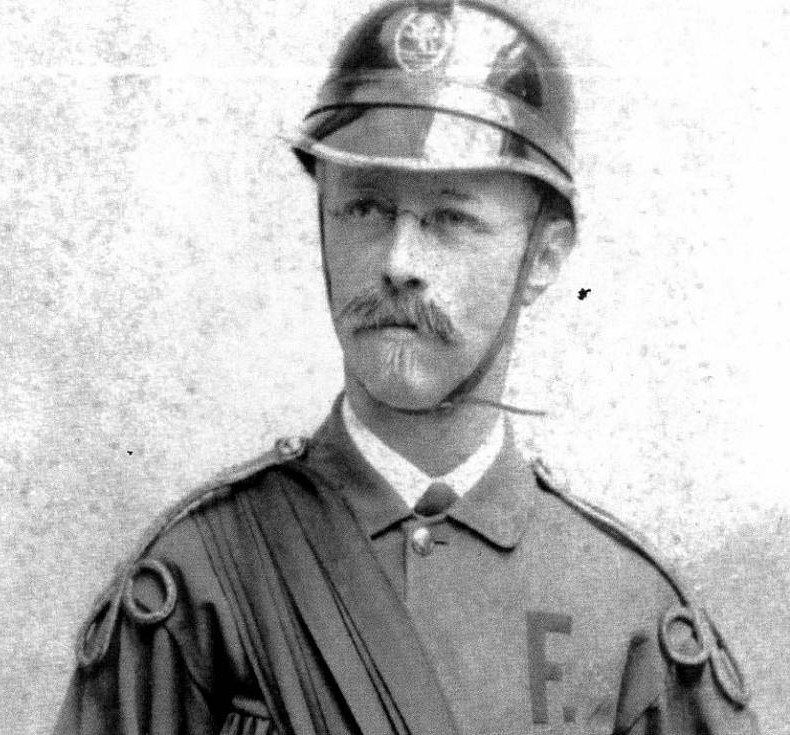 Eduard Knoll (1839 - 1890), Český a rakouský právník a politik.